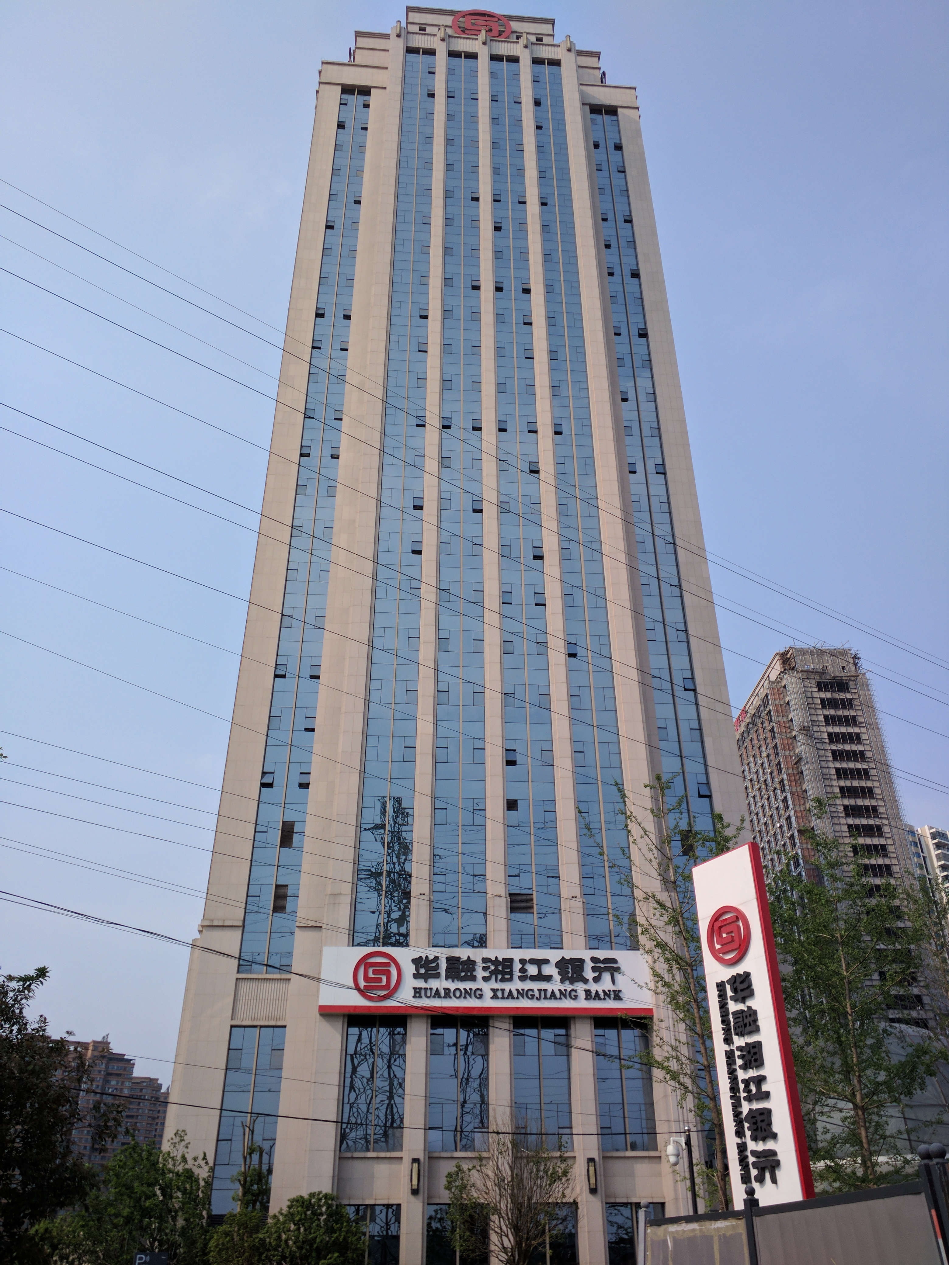 中文（中国大陆）: 位于长沙市雨花区湘府东路二段208号的华融湘江银行大楼